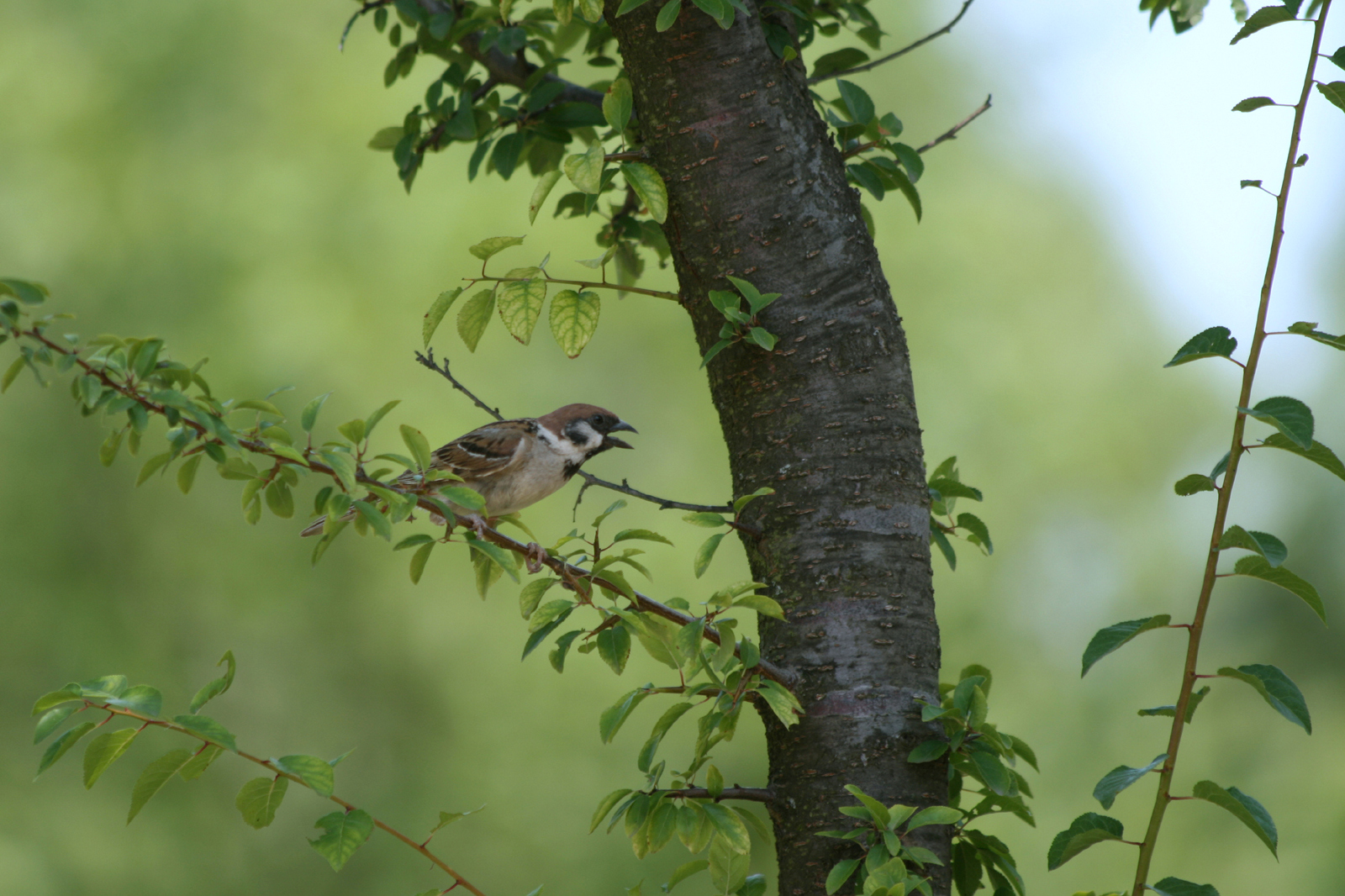 Oiseau pres de la rivière Zasavica